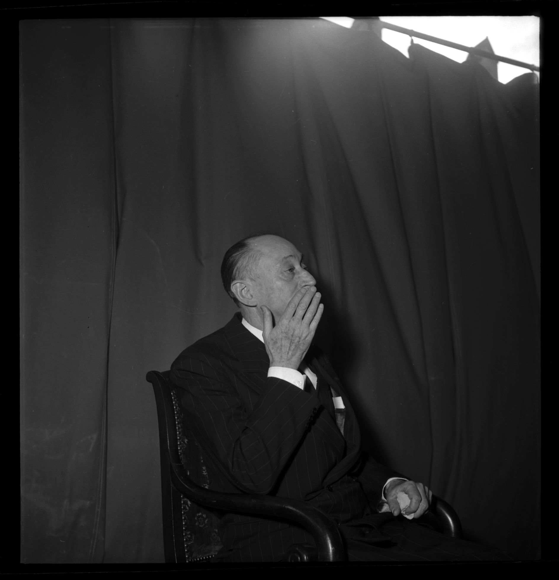 Halle au marché, place du Maréchal-Leclerc à Mirepoix (Ariège). 1953. Vue du duc de Levis-Mirepoix lors de la cérémonie sous la halle de Mirepoix.